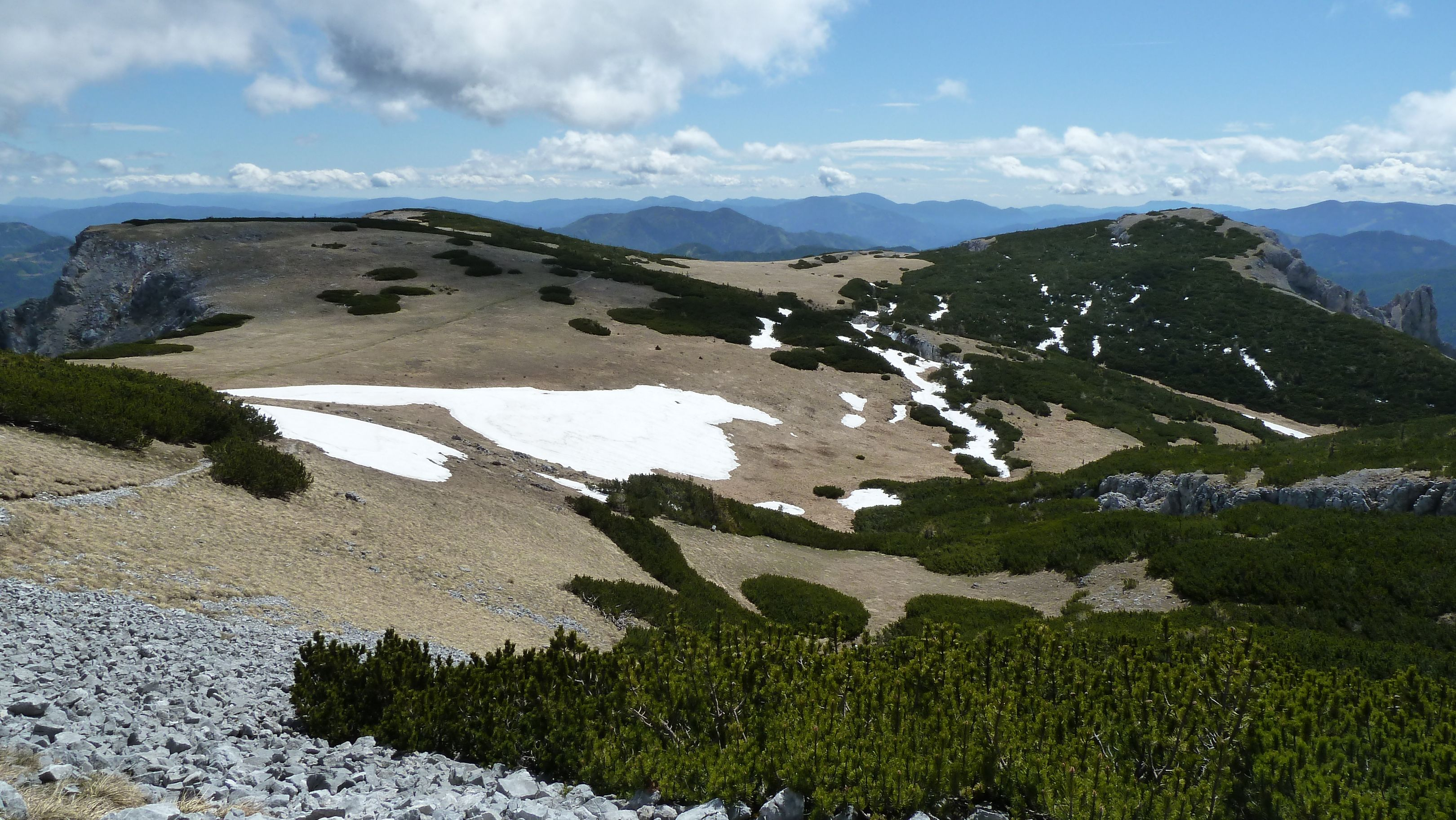 Almböden im Bereich des Trenchtlings; Bereich Edelweißböden, Blick Richtung Osten This media shows the nature reserve in Styria with the ID NSG 96 c.